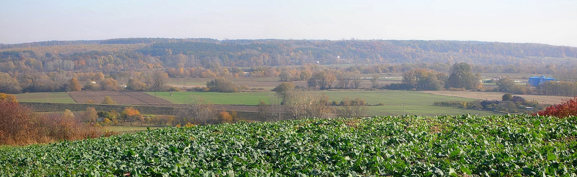 Fordoński przełom Wisły